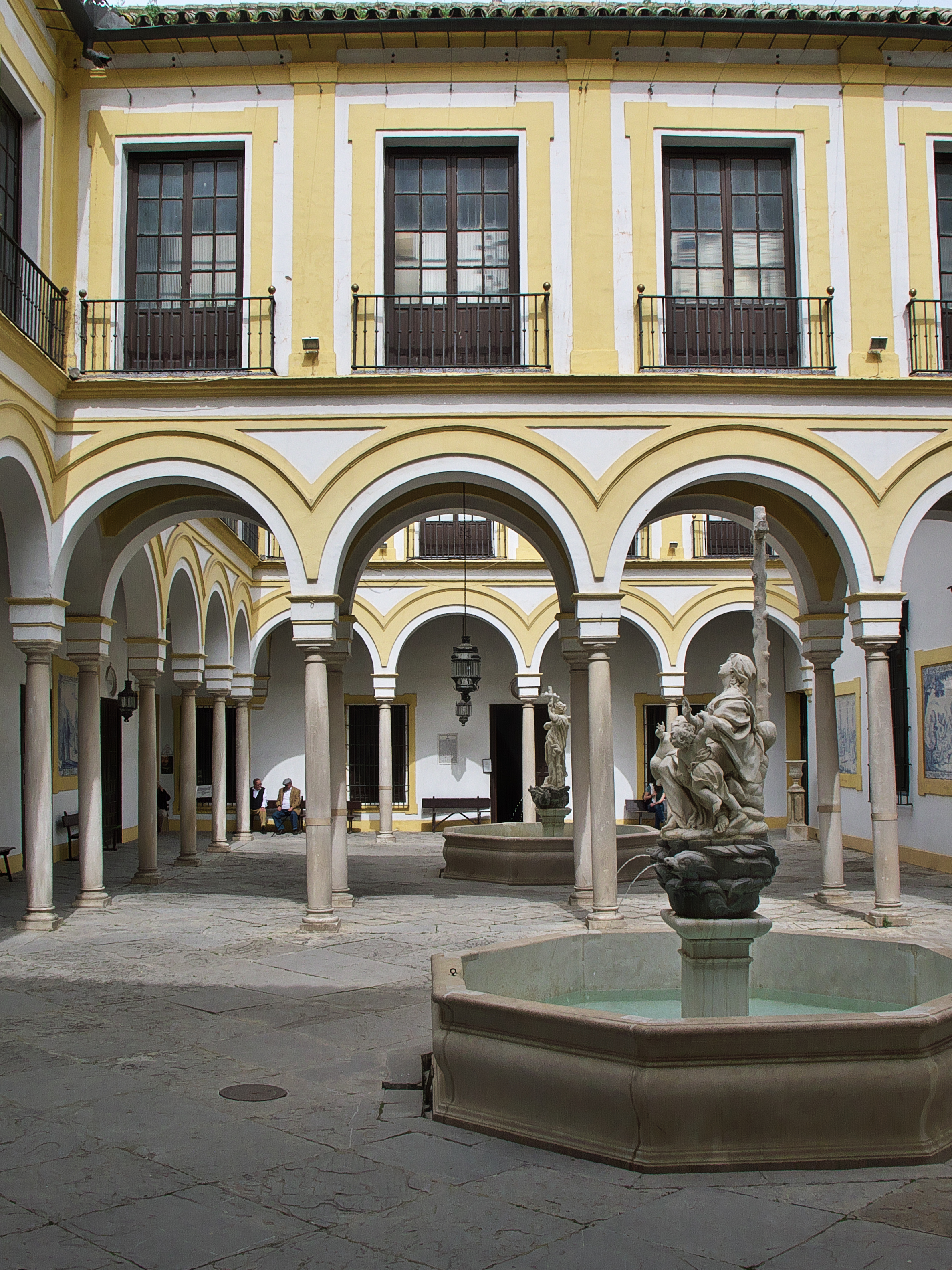 Obra del maestro del barroco sevillano, Leonardo de Figueroa.